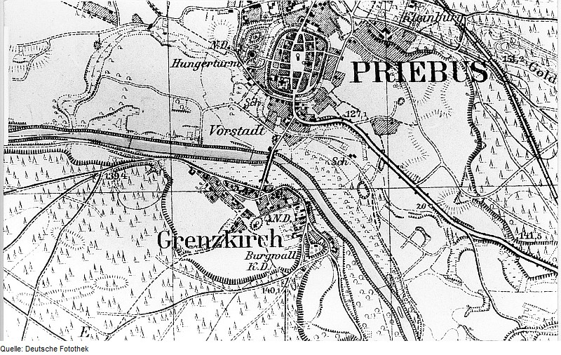 Original image description from the Deutsche Fotothek Krauschwitz-Podrosche. Meßtischblatt, Sekt. Priebus, Nr. 4555, 1940